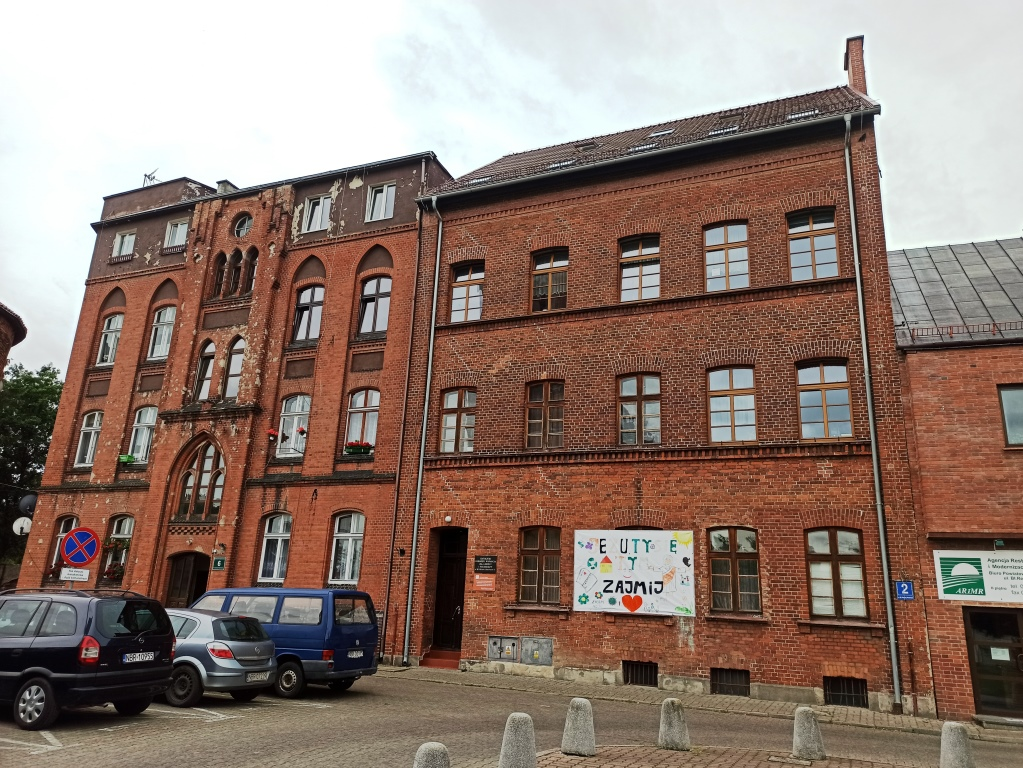 Braniewo katarzynki sierociniec 2020